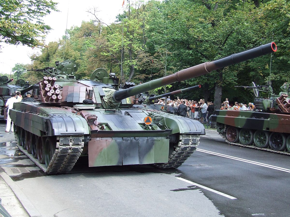 PT-91